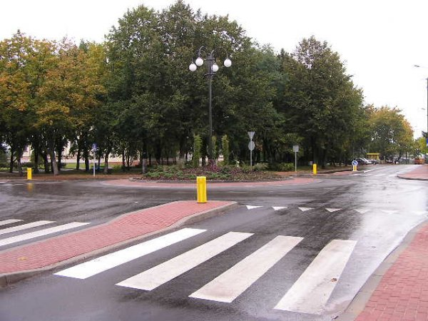 Jabłonna Lacka - Przedszkole nr 5 "Kubusia Puchatka", na drugim planie Zespół Szkół Specjalnych im. Jana Pawła II